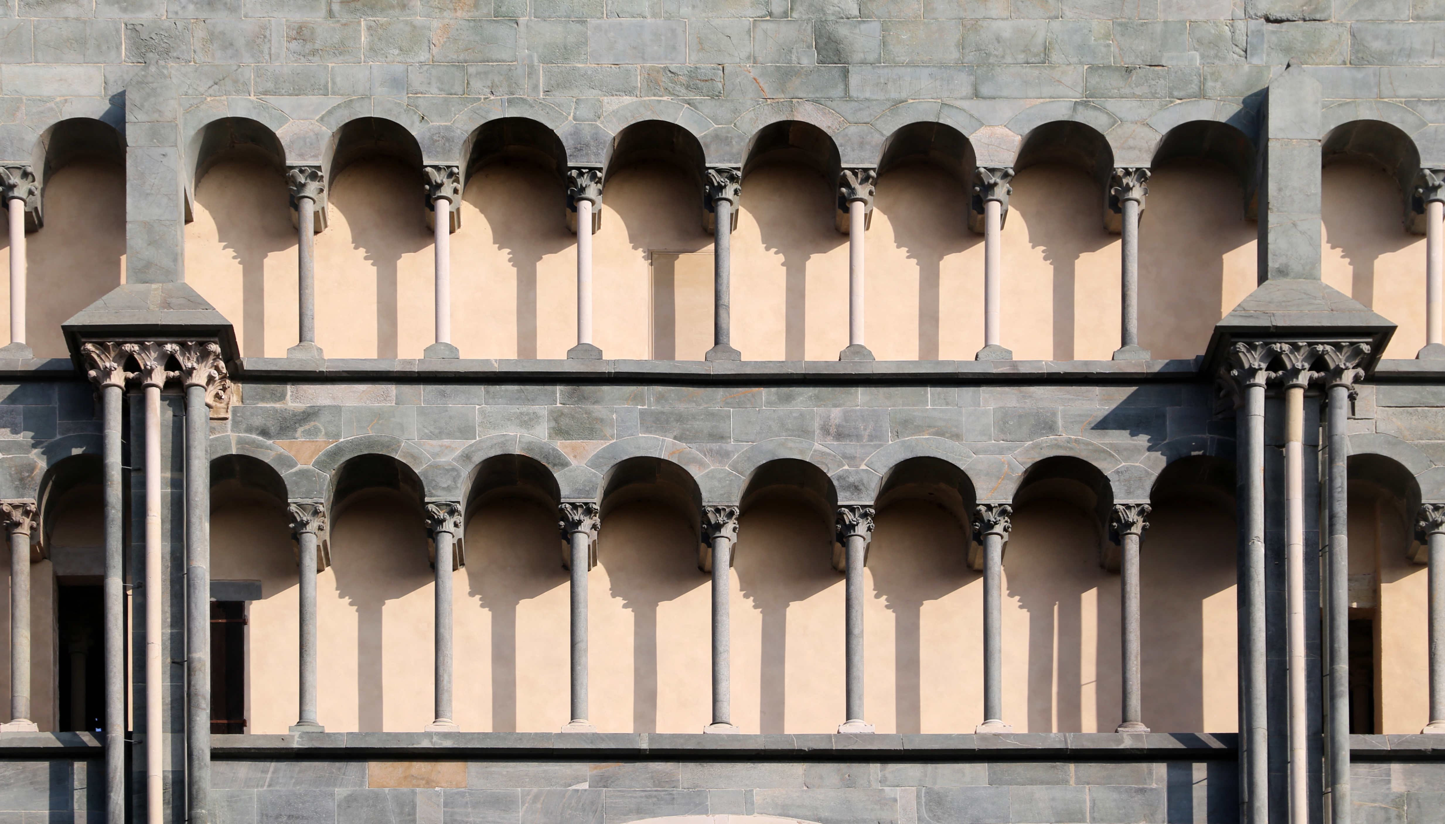 basilica di Sant'Andrea This is a photo of a monument which is part of cultural heritage of Italy.